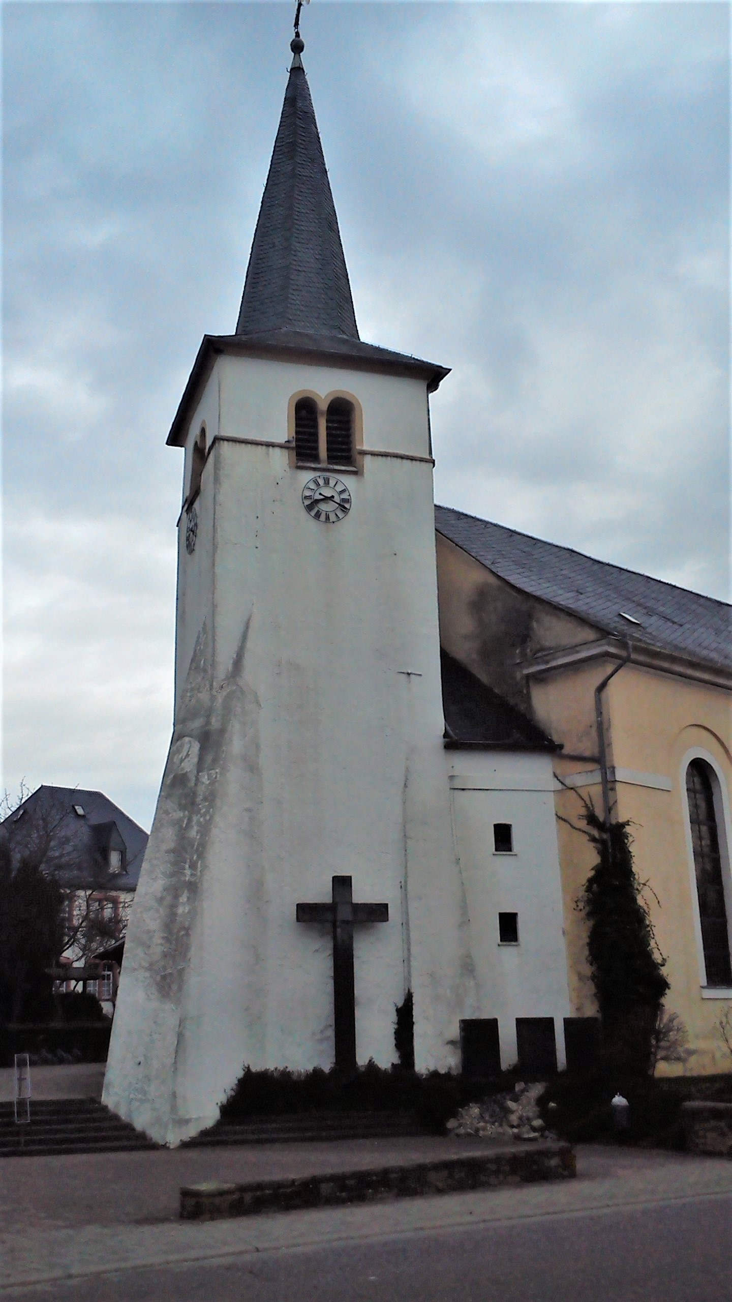 Gotischer Turm von St. Albanus Schillingen